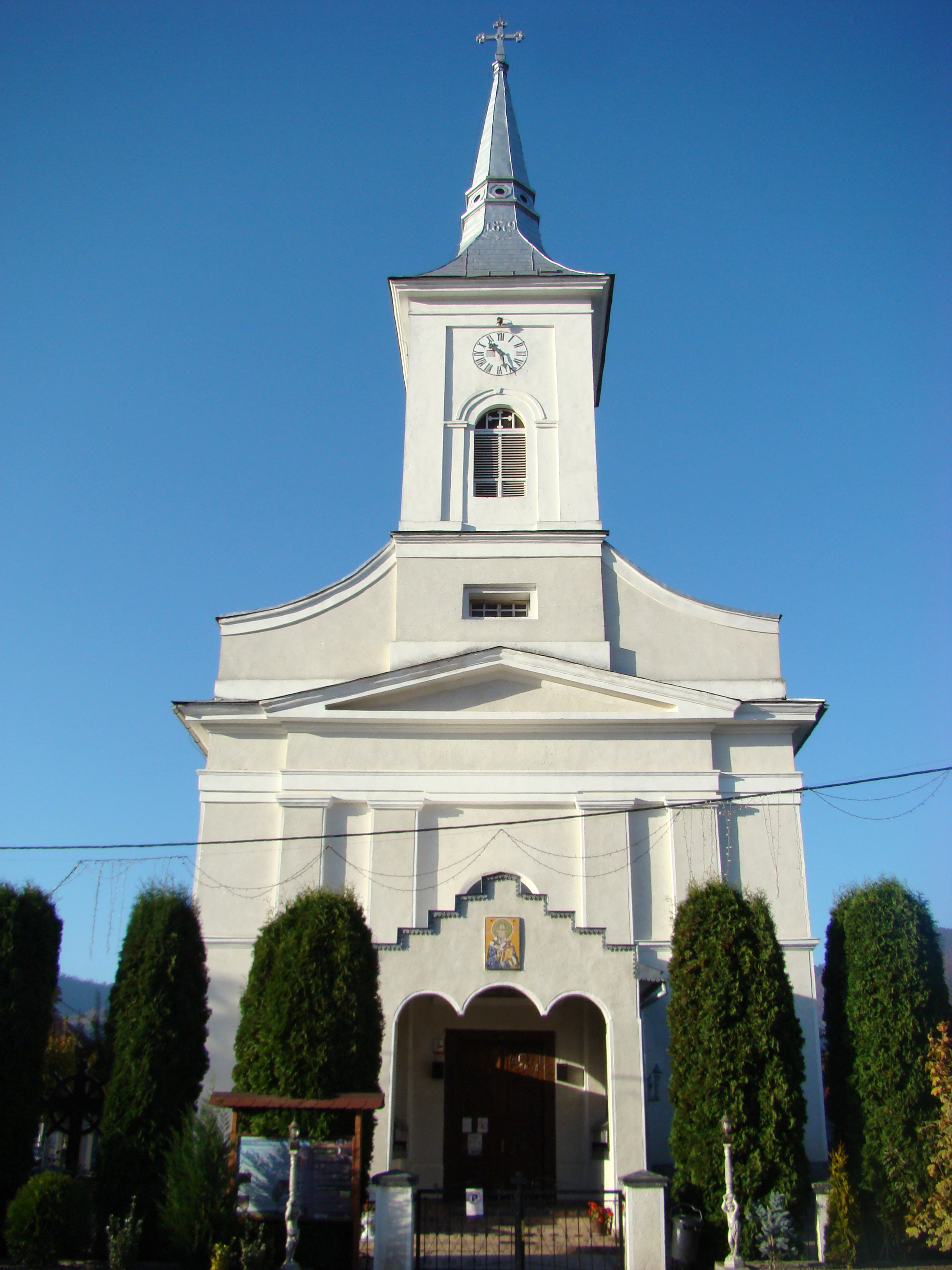 Biserica „Sfântul Ierarh Nicolae” din Prundu Bârgăului, județul Bistrița-Năsăud